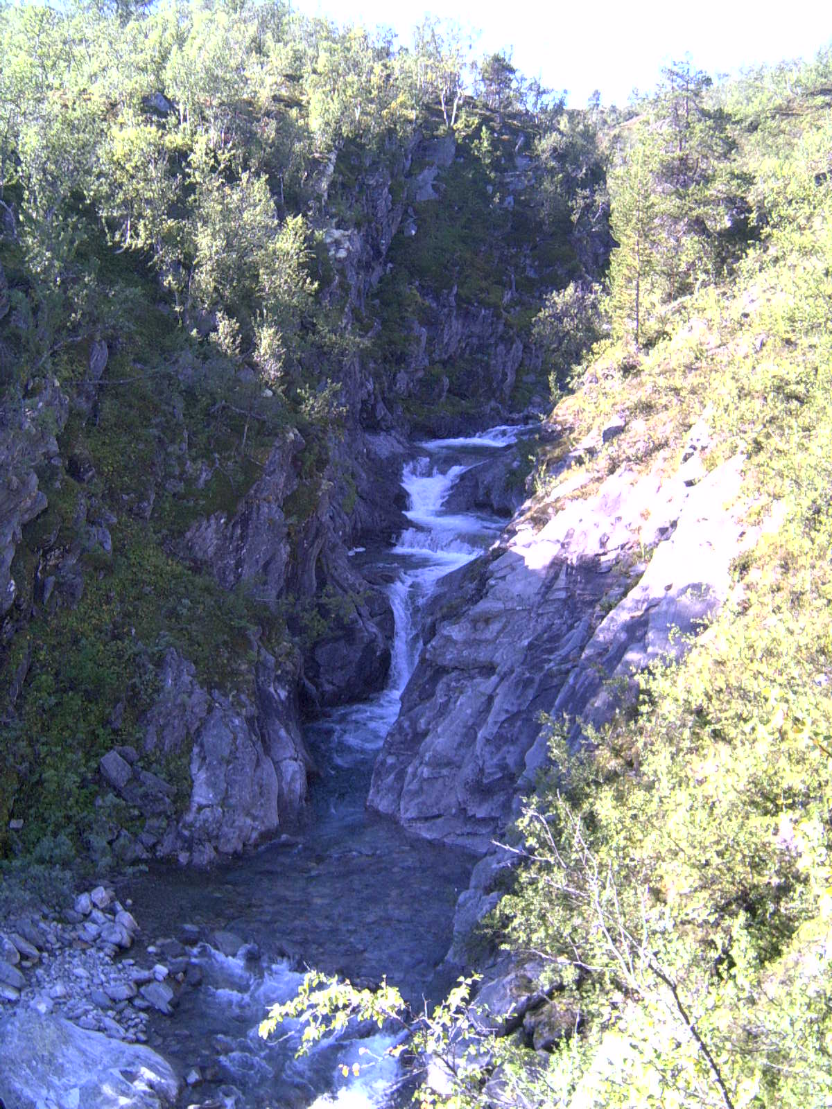 Gjel: Elvegjel.